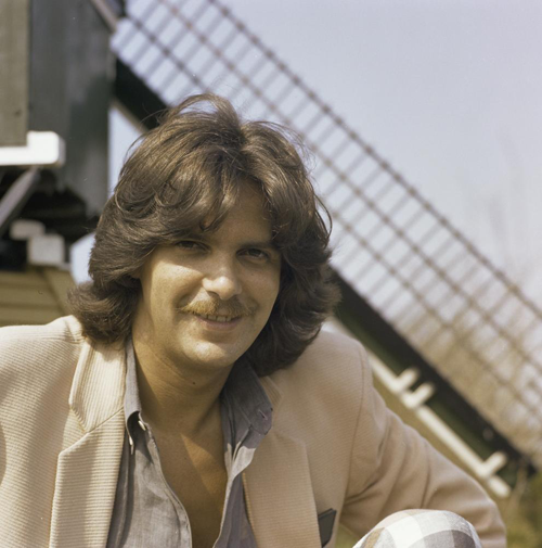 De Italiaanse zanger Alan Sorrenti tijdens een fotosessie voor het Eurovisie Songfestival 1980